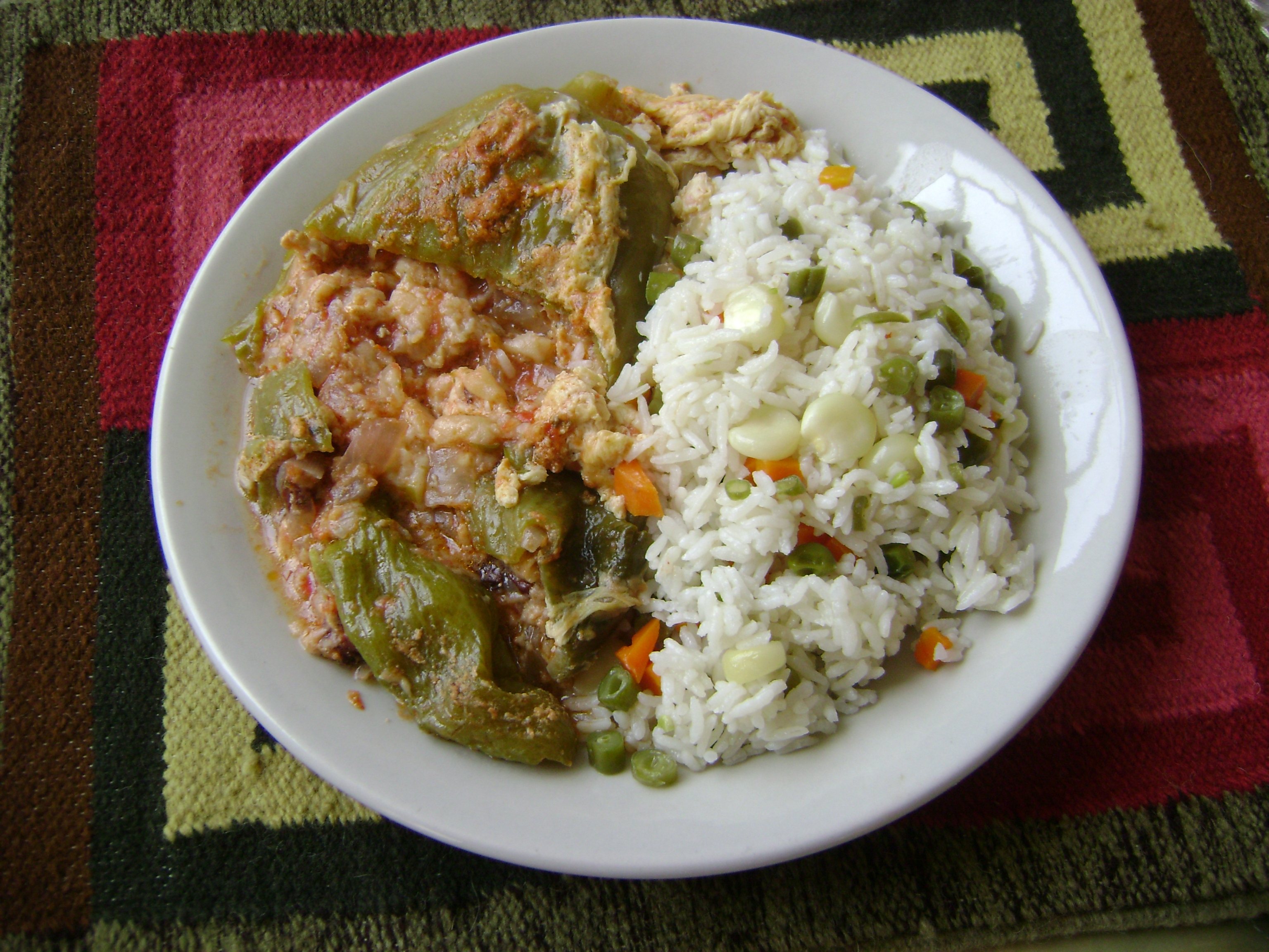 Caigua rellena con arroz blanco.